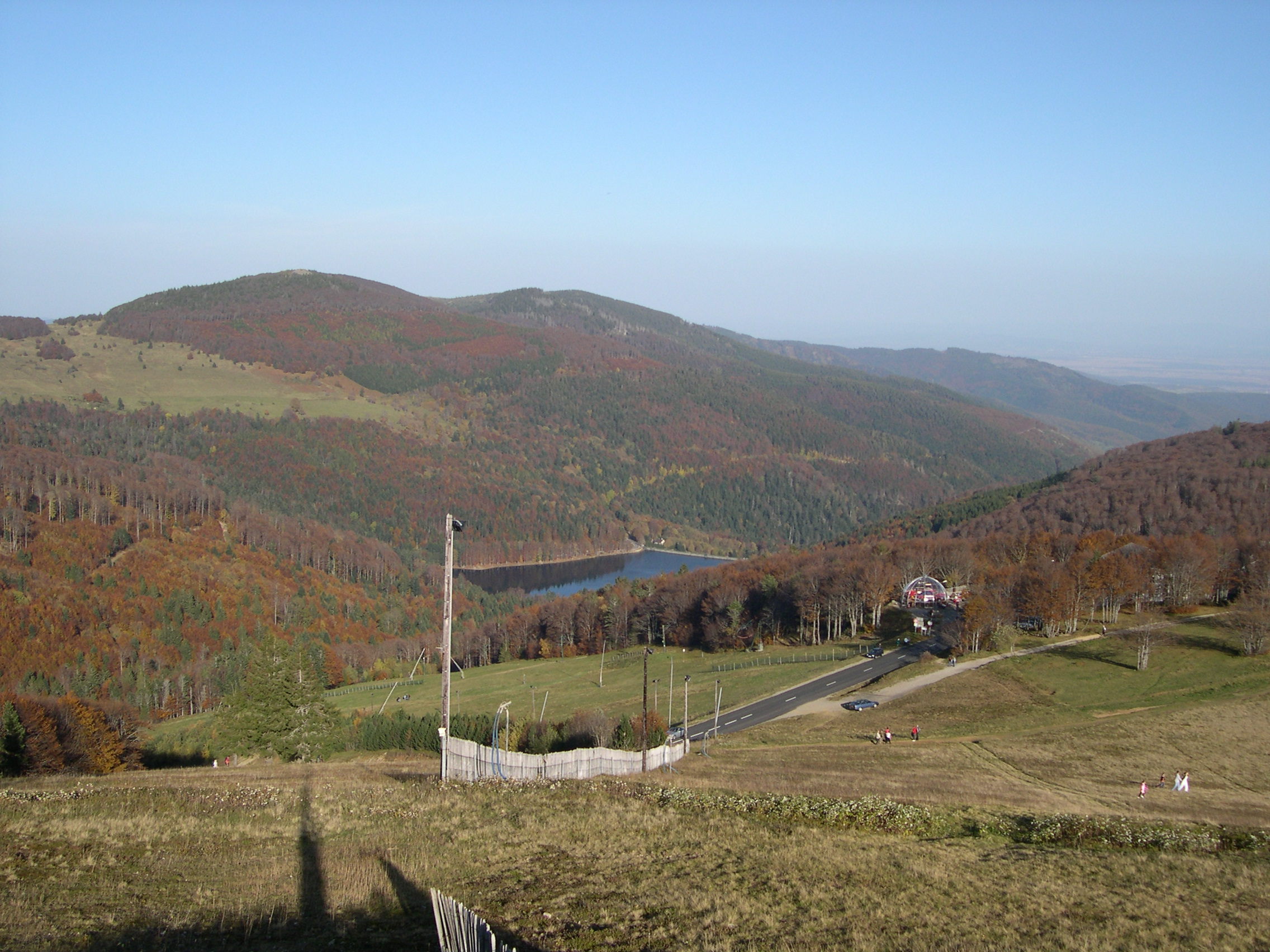 Le Markstein, dans le massif des fleurs, en pleine saison hivernale..... Libre de droit